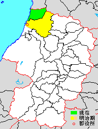 Map of Akumi District, Yamagata, Japan